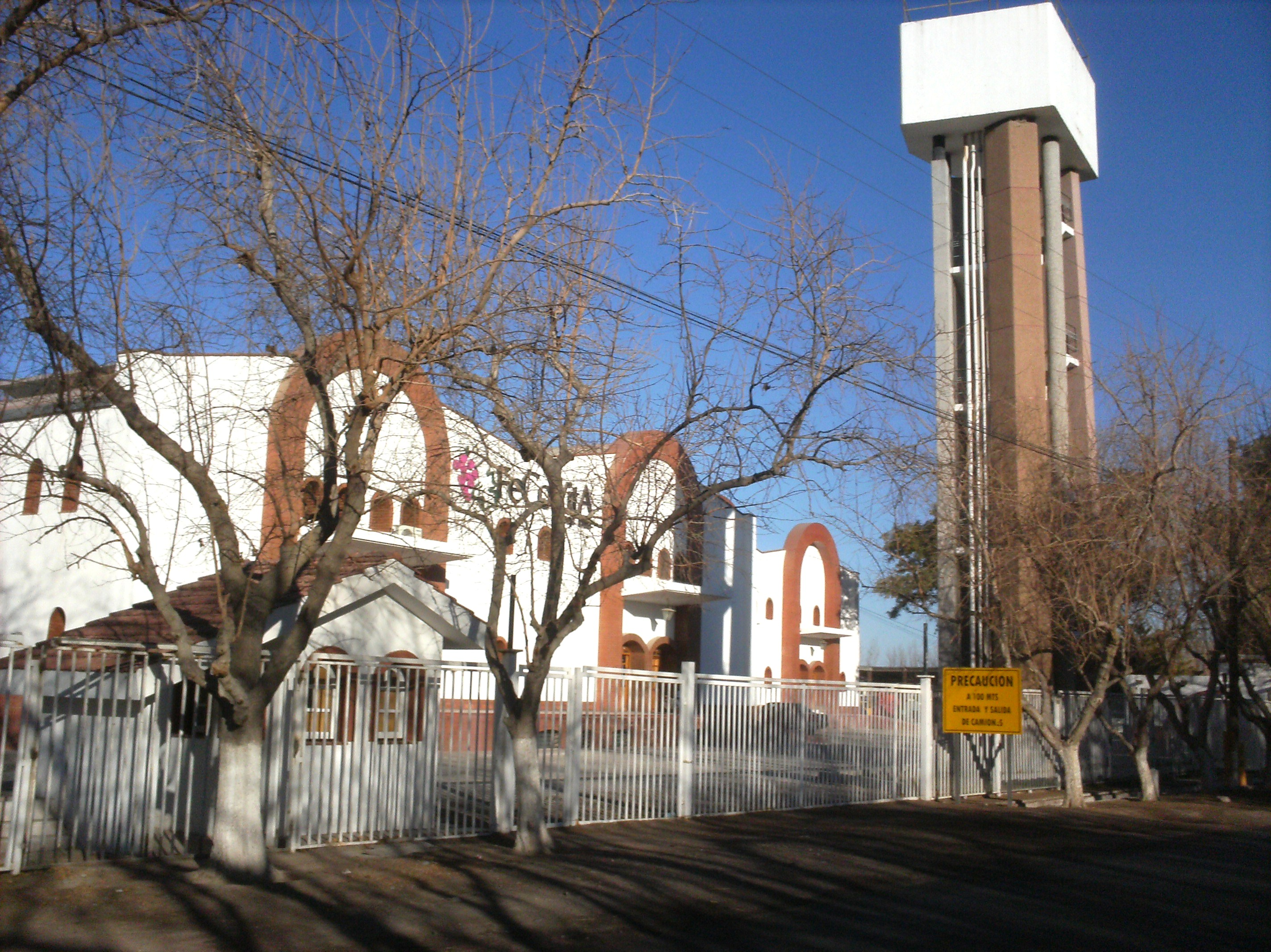 fecovita en su produccion de vinos